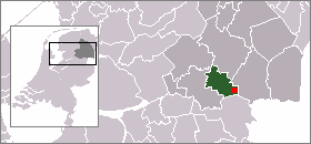 De locatie van Nieuwlande binnen de gemeente Hoogeveen. Afbeelding gemaakt door Marco Roepers op basis van kaart vervaardigd door Mtcv. Vrij voor gebruik.